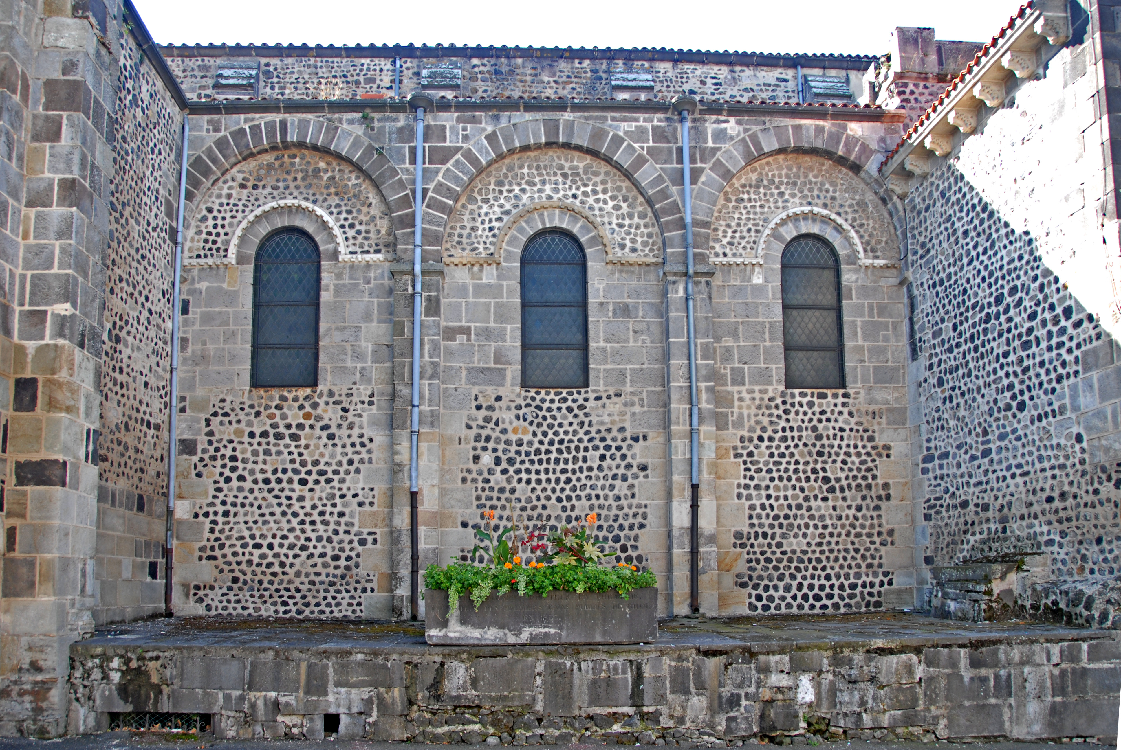 Mozat, Langhaus Nordseite, Joche 4 -6